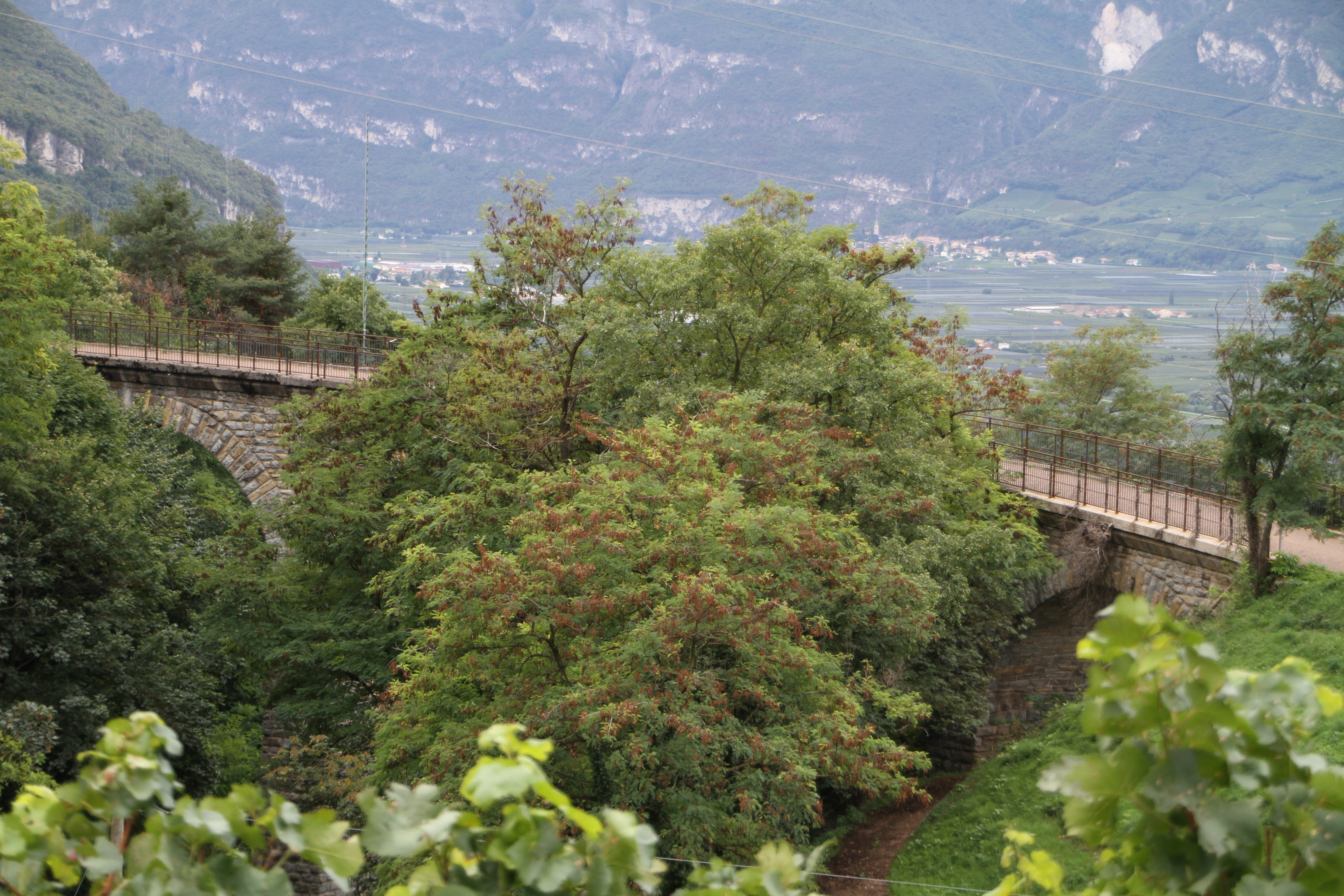 in Montan, 1917/18 - 1963